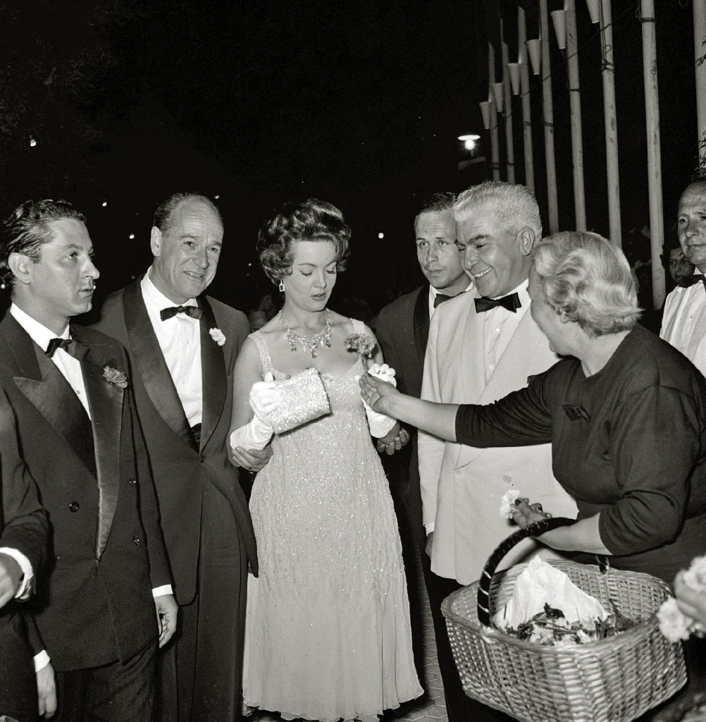 Título original: Festival de Cine de San Sebastián (52/110) Localización: San Sebastián (Guipúzcoa)